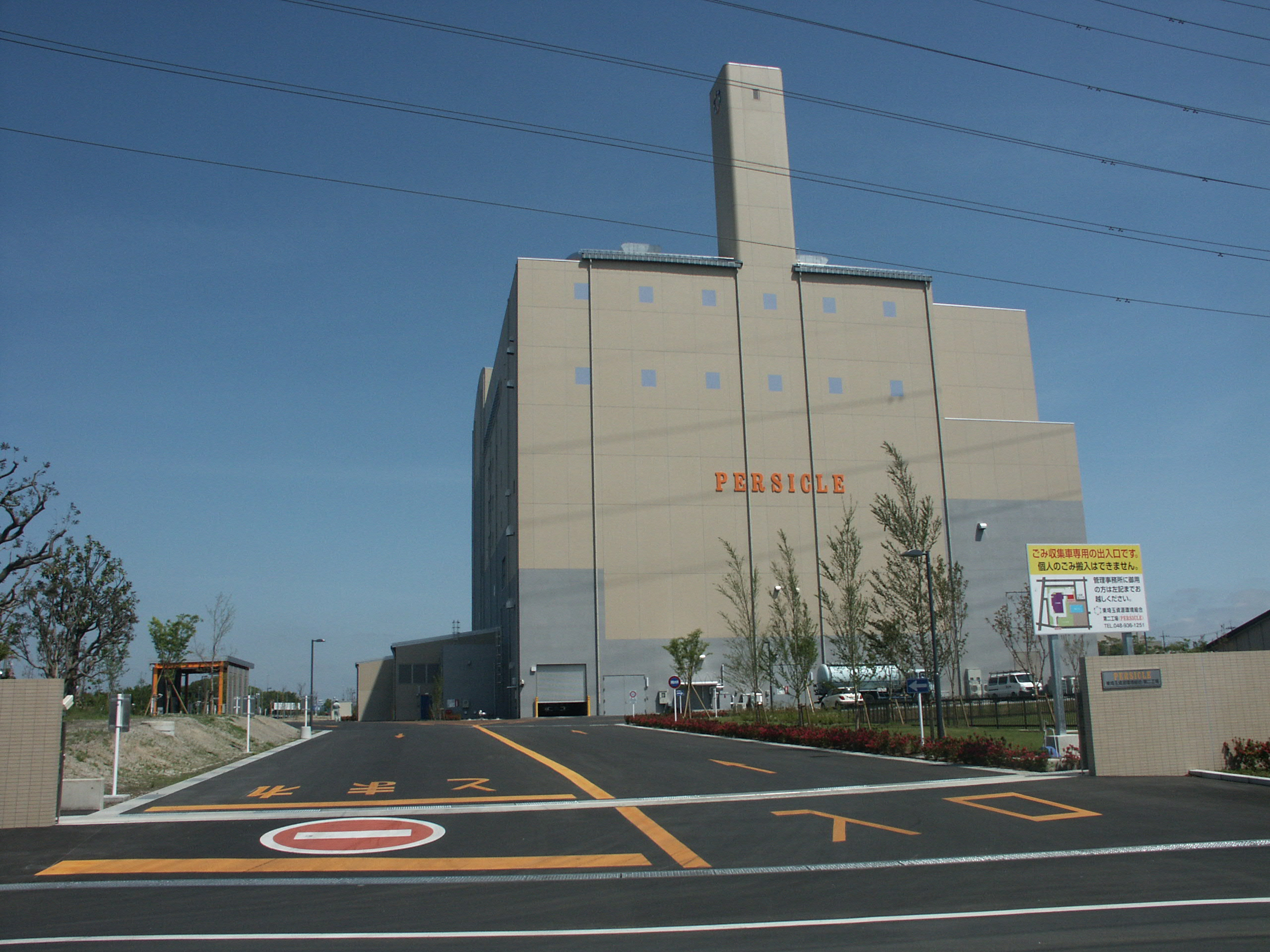 東埼玉資源環境組合第２工場建屋